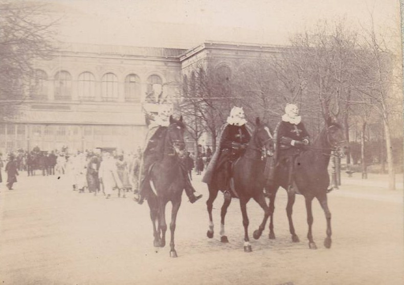 Chats mousquetaires à cheval de l'École vétérinaire d'Alfort défilant au cortège parisien de la Mi-Carême 1894. Derrière on distingue la foule du cortège des animaux de la Création.